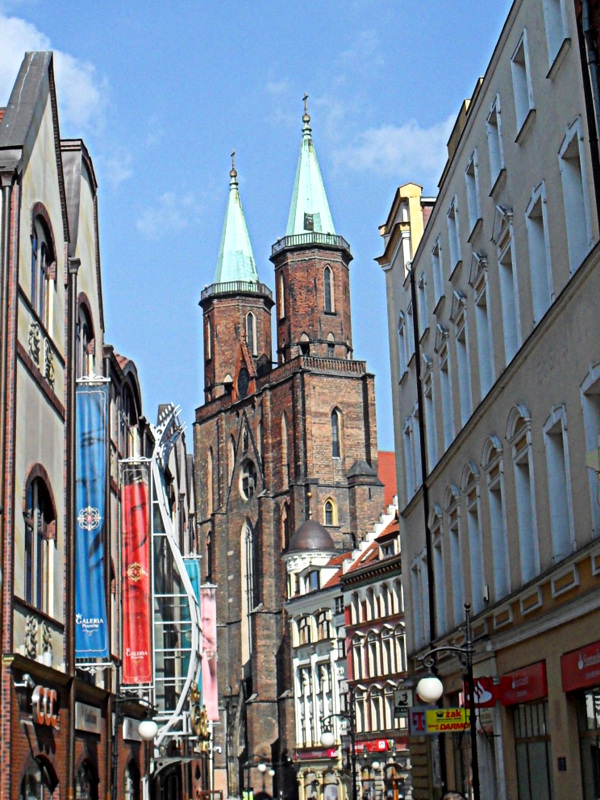 Legnica, pl. Mariacki - dawny kościół katolicki, obecnie kościół ewangelicko-augsburski NMP